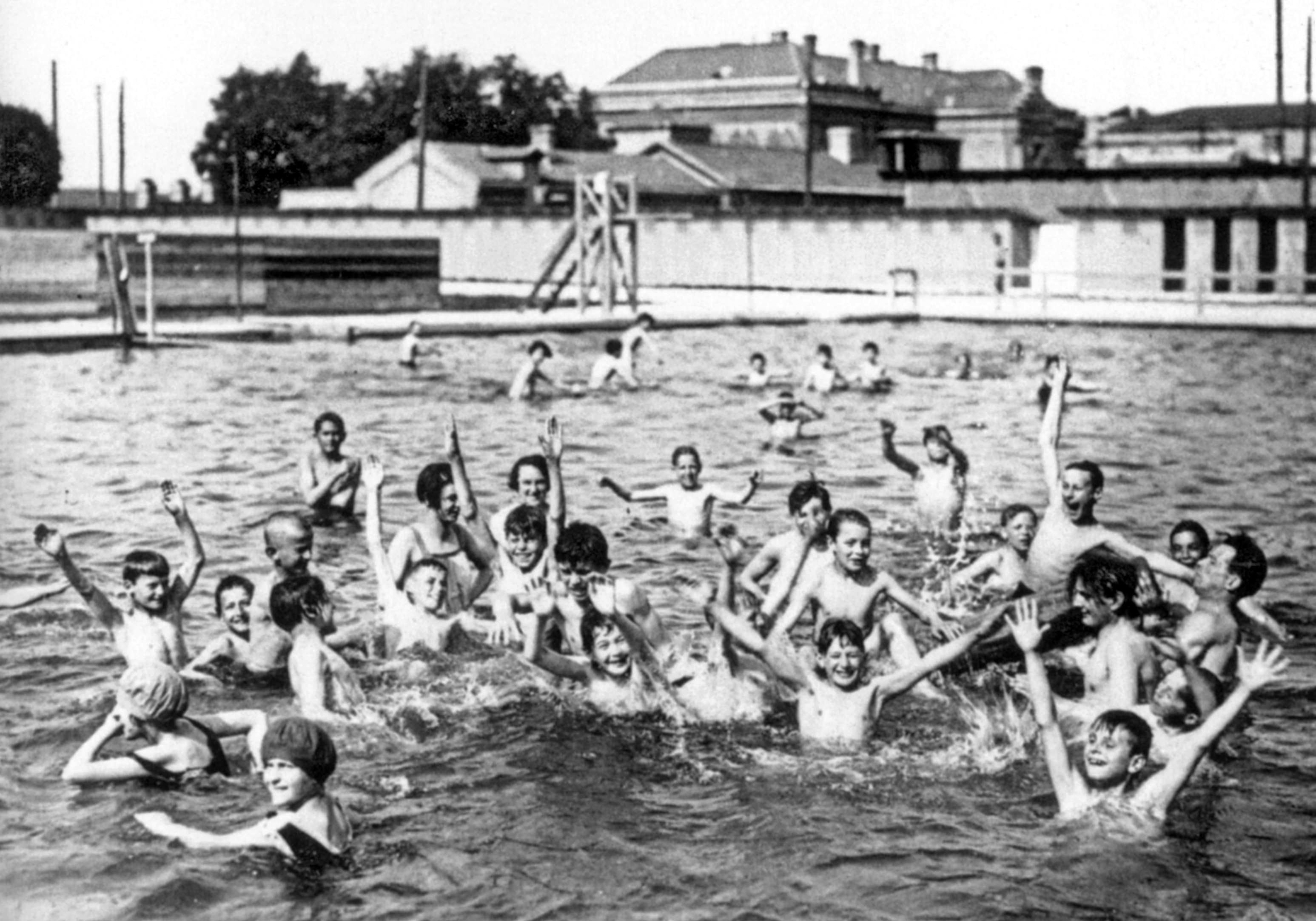 Baden bei Wien, Mühlgasse, Freibad Gänsehäufl